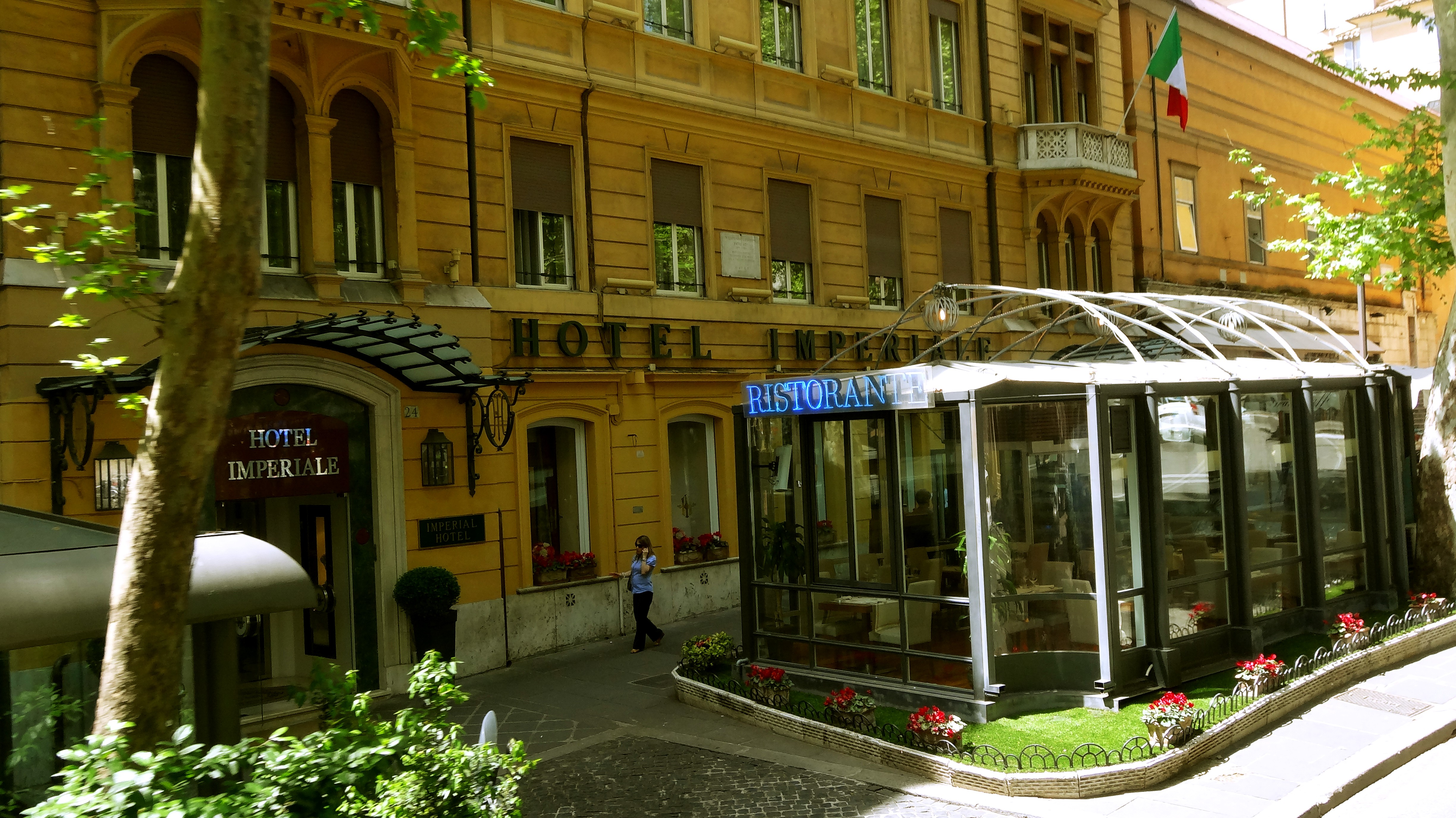 Italia - Roma 2013